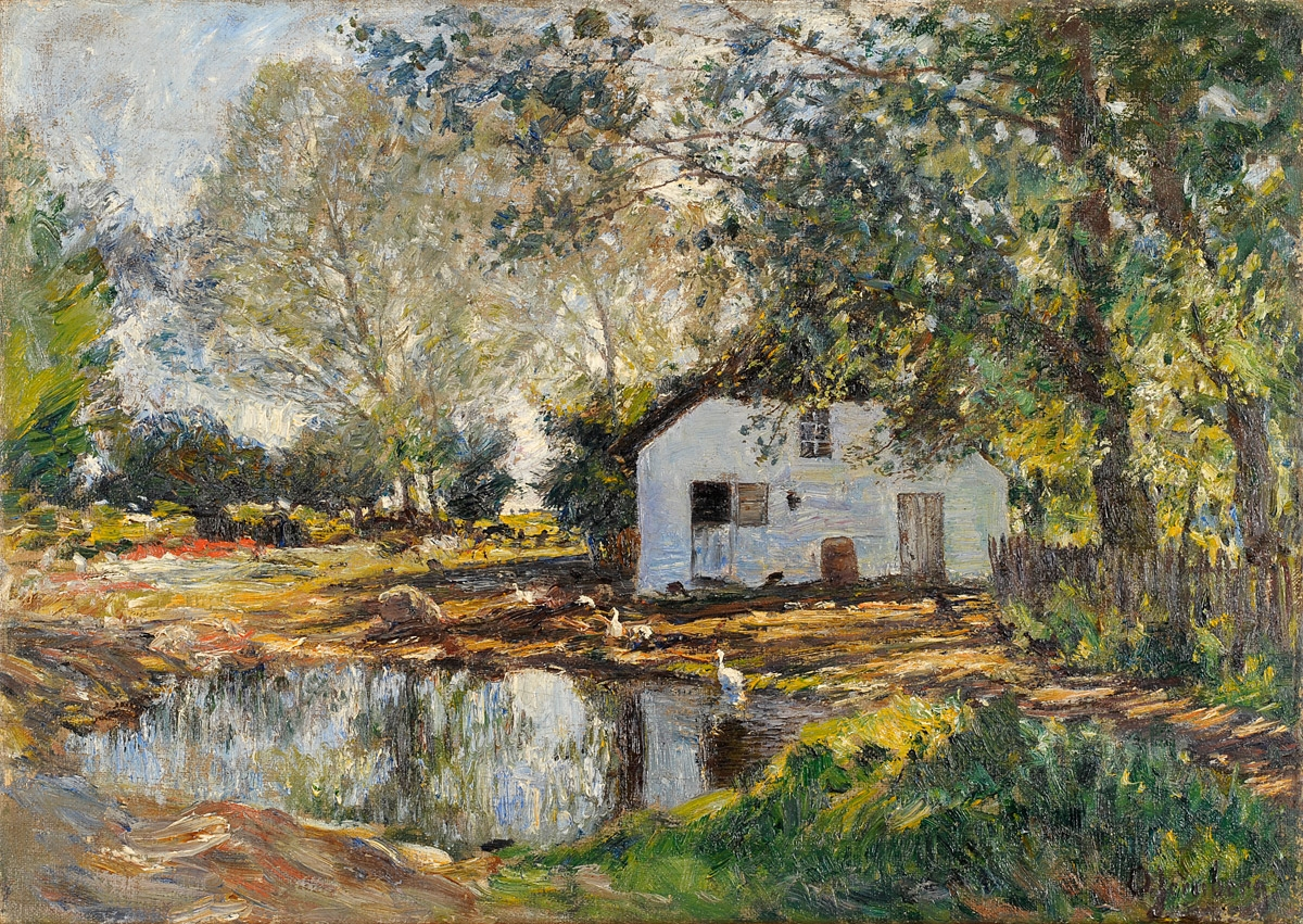 Sommertag auf dem Lande. Signiert. Öl/Lwd., 33 x 46,5 cm